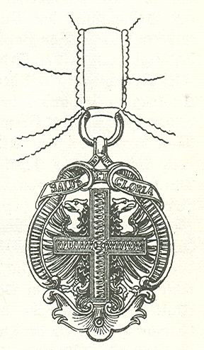 Scan van het boek van de in 1904 gestorven Maximilian Gritzner Uitgave 1884 Sternkreuz-Orden. Scan van Blz. 289 van het boek "Handbuch der Ritter- und Verdienstorden " uitgegeven 1893 door Weber.Tekening van de in 1902 overleden Maximilian Gritzner. Robert Prummel 10 jul 2008 16:40 (CEST)